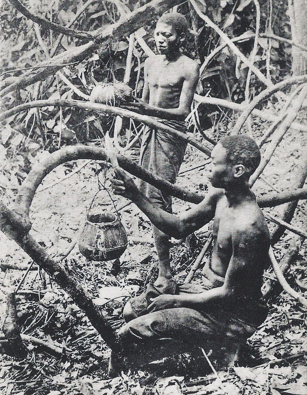 Lianes à caoutchouc dans la forêt (Lusambo). Récolte du latex. Congo. Nels, Bruxelles, série 14, n° 58